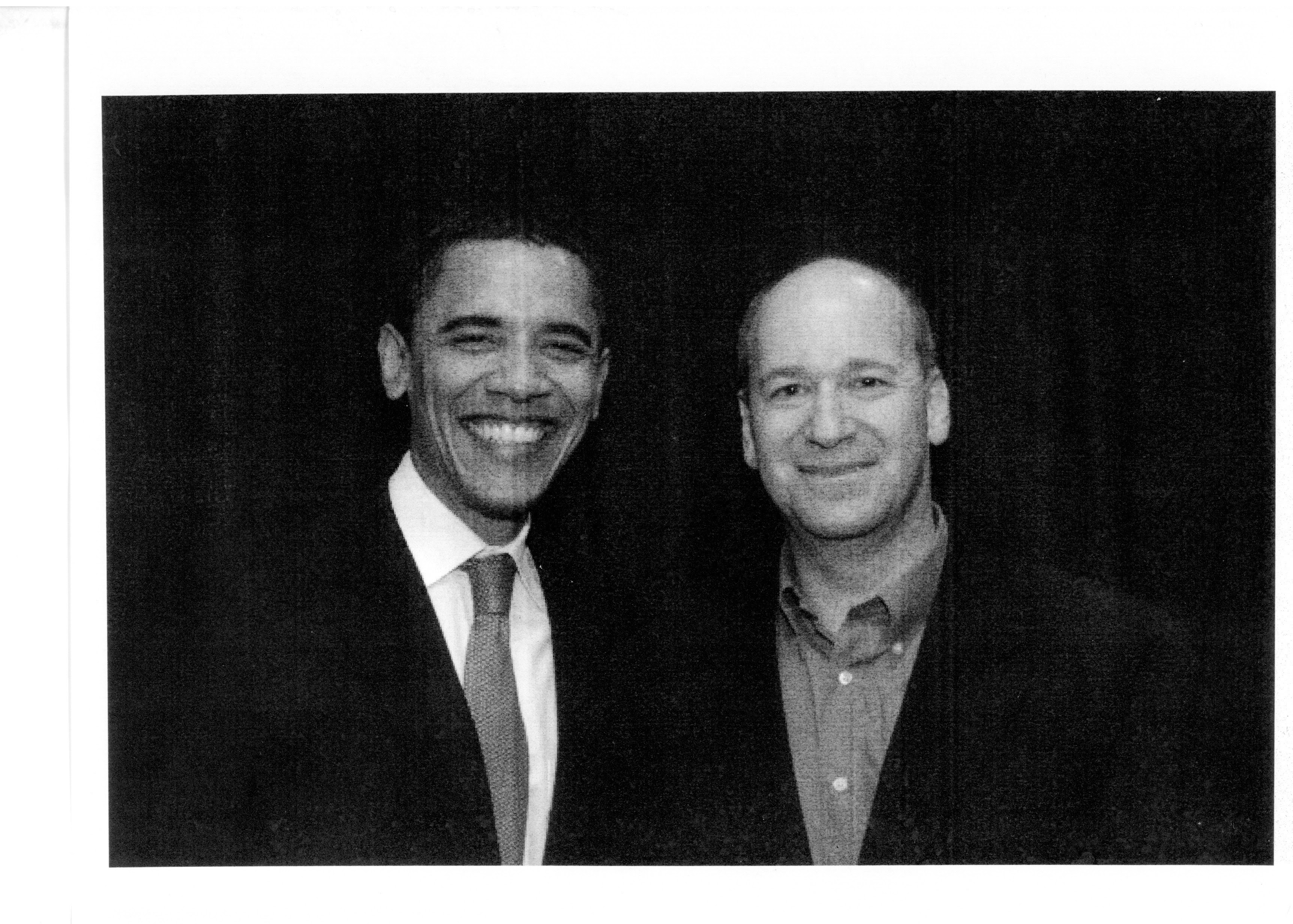 נדב תמיר עם נשיא ארה"ב, ברק אובמה